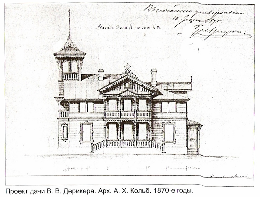 Кольб Александр Христофорович - Проект дачи Дерикера (1875)